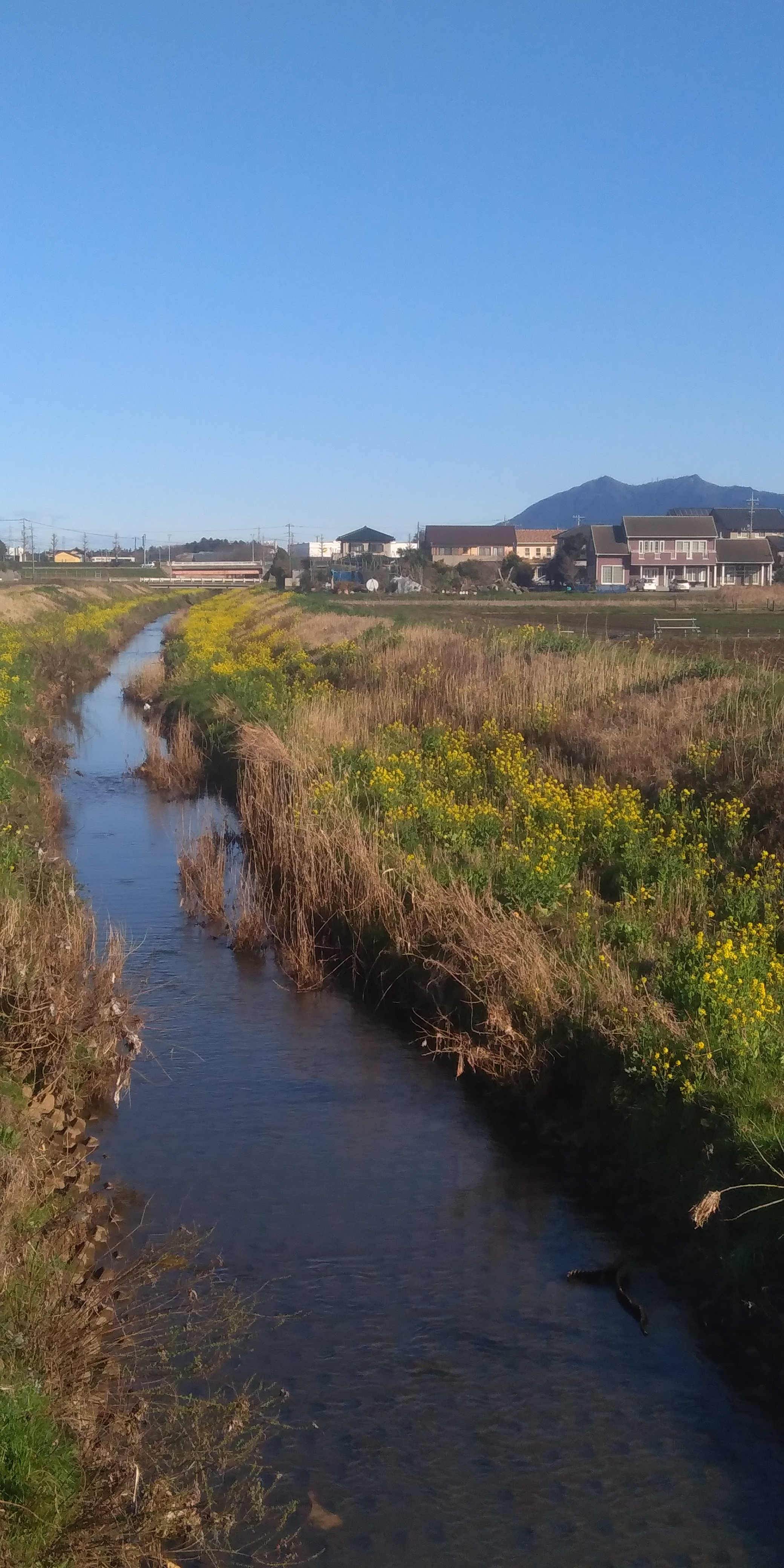 つくば市にある中神橋から上流を望む